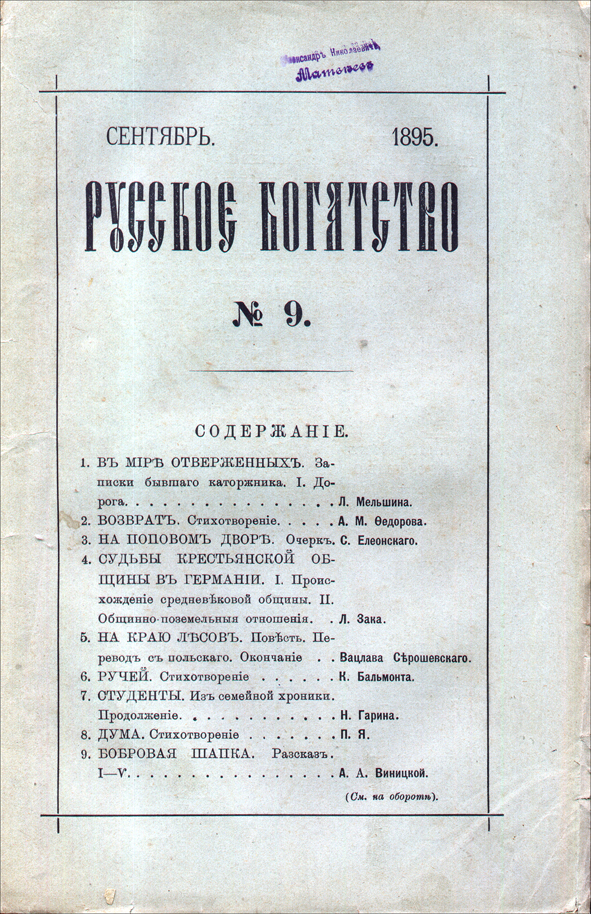 Обложка журнала "Русское богатство", 1895 г.